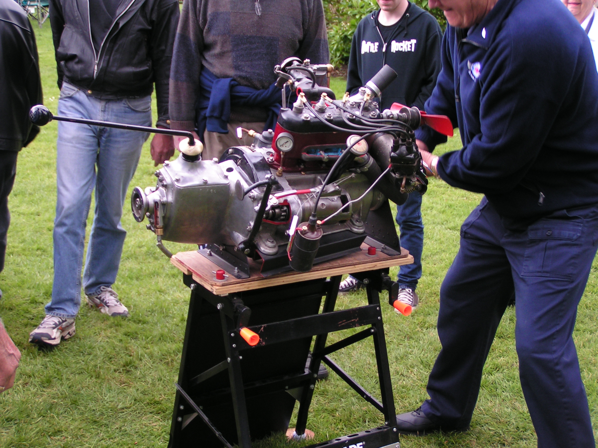 Austin Seven engineAustin Seven Engine